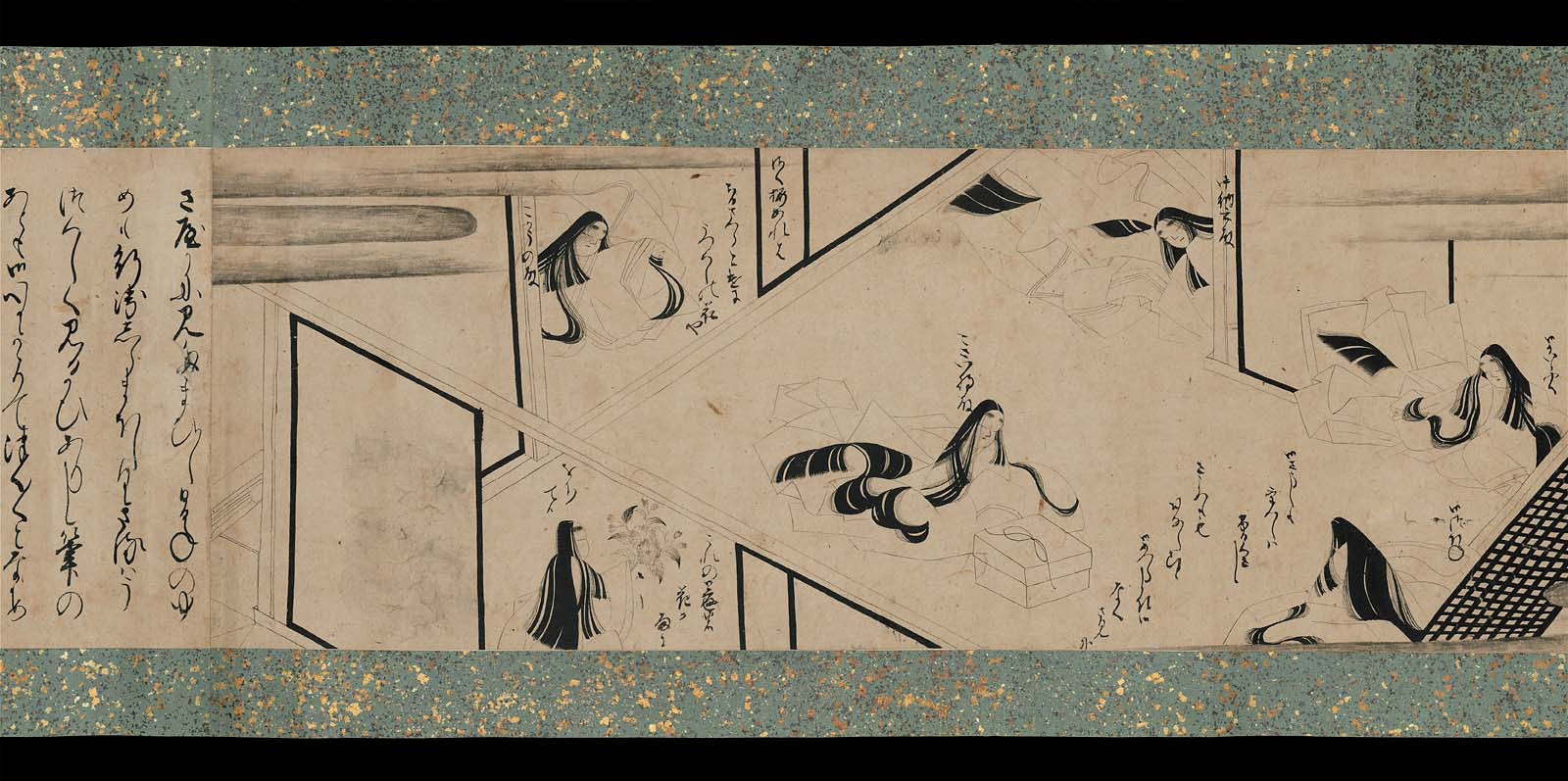 Utatane soshi emaki, 13.5 x 521.5 cm. 16e siècle. Musée des beaux-arts de Boston, n° 11.9456.